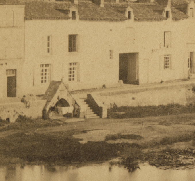 Détail d'une photo du XIXe siècle montrant la Fontaine du Pont-Joubert dans sa configuration d'origine, vers 1880